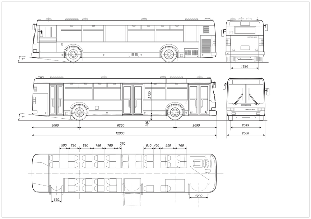 Ikarus 412.02 jellegrajz